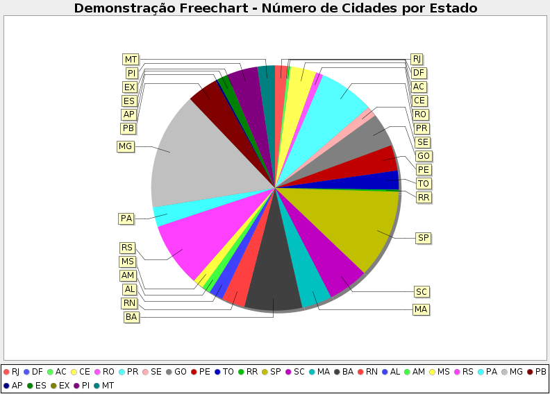 Gráfico de tortas no Freechart